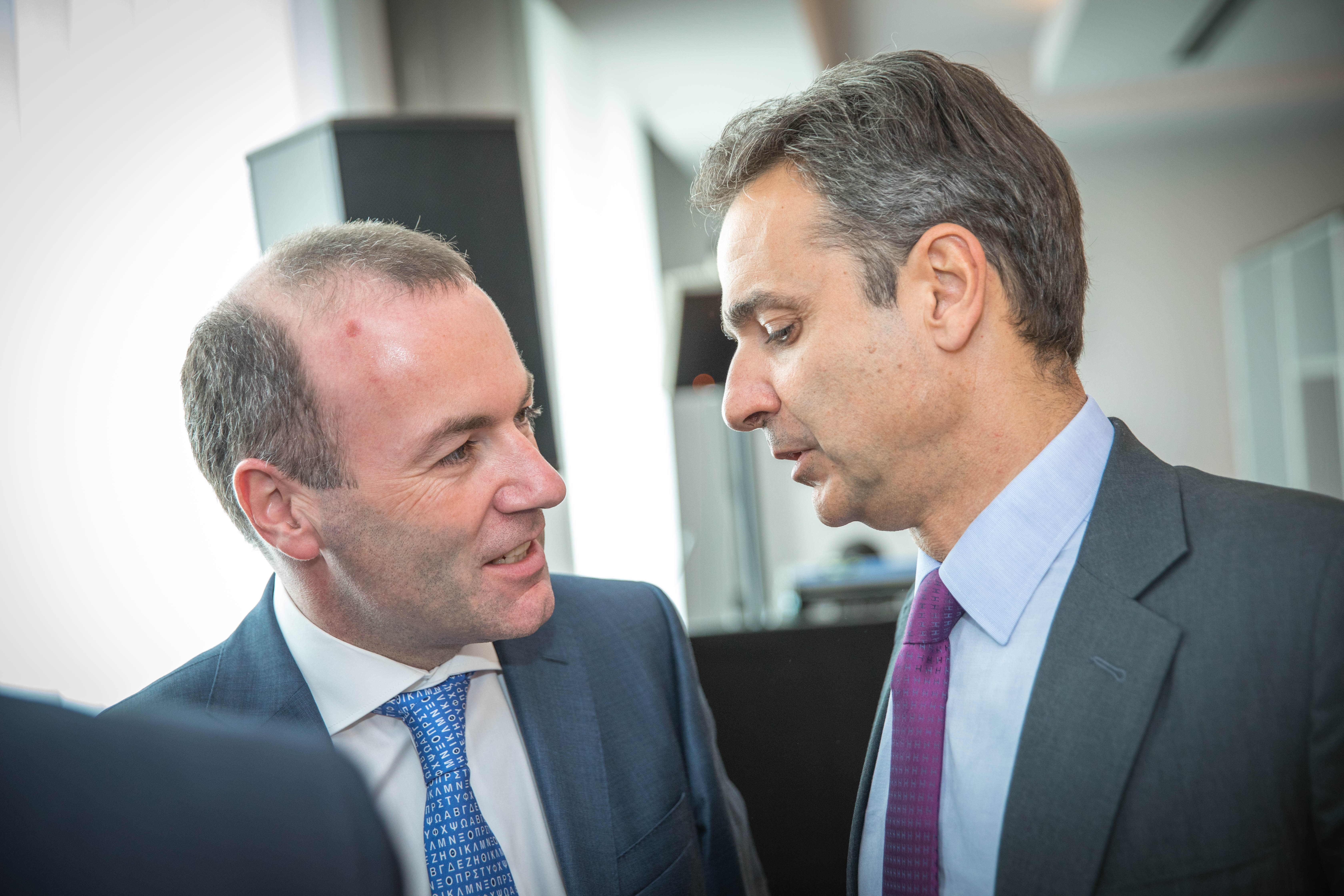 EPP Summit, Brussels, May 2019